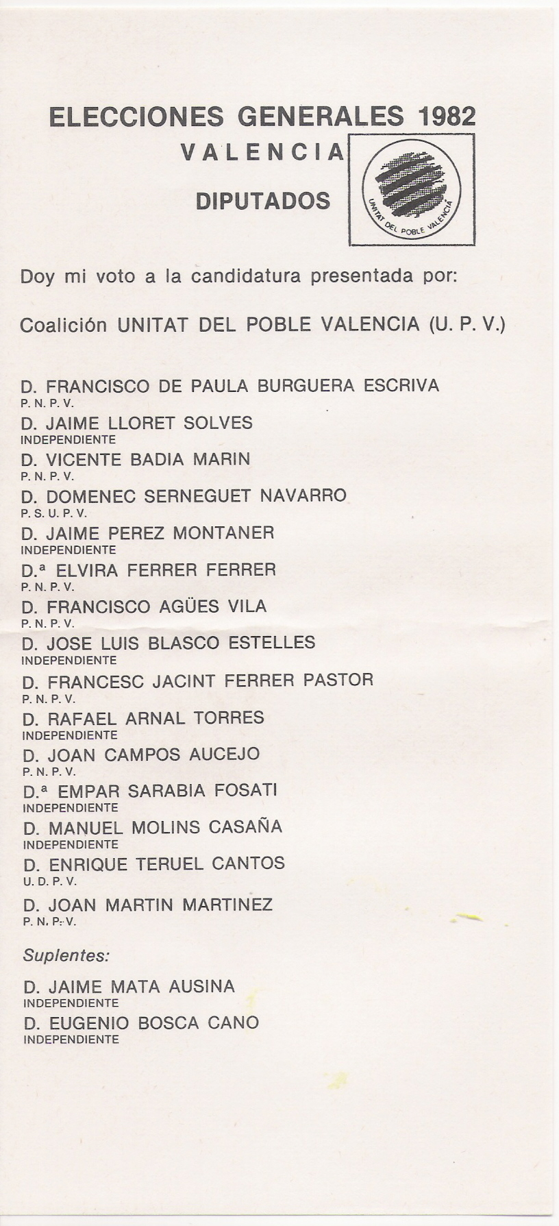 Papeleta electoral de la Unitat del Poble Valencià al Congreso por Valencia en 1982.